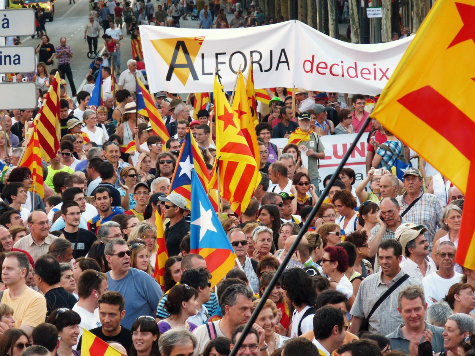 alforja